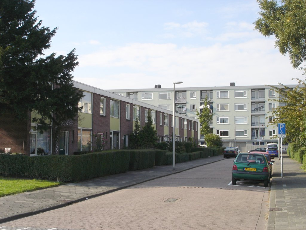 The Tacitusstraat in the deelgemeente IJsselmonde, district Lombardijen/Homerusbuurt in Rotterdam